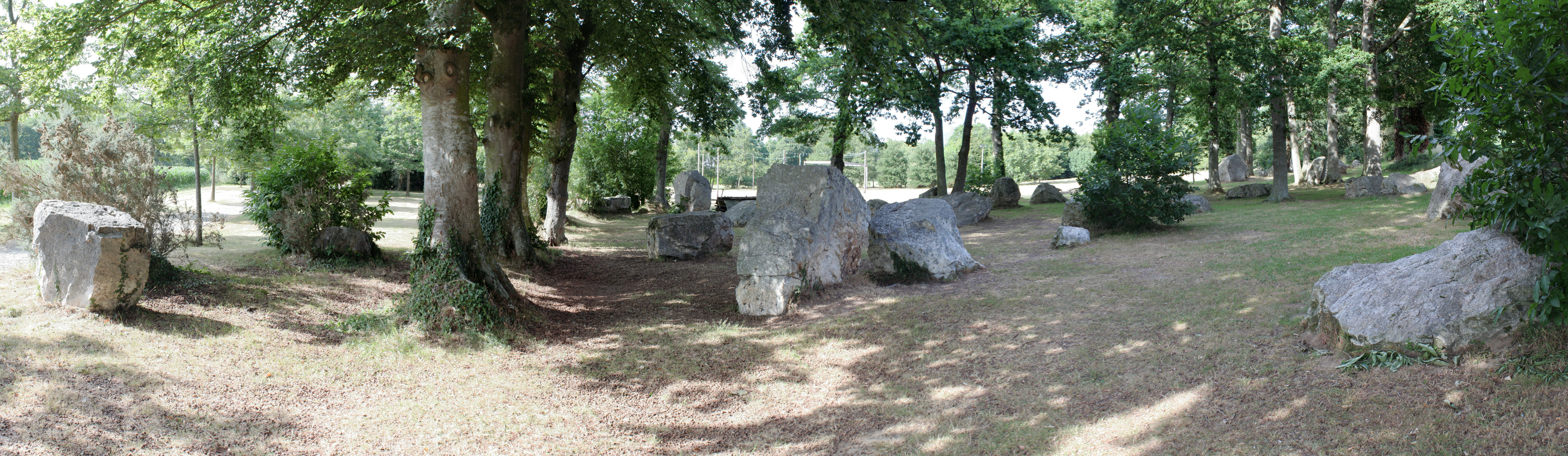 Alignement de menhirs de Pleslin-Trigavou.